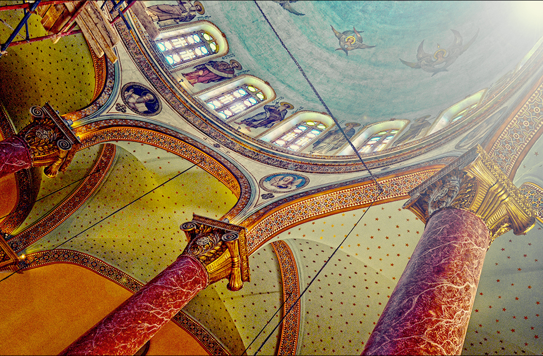 كنيسة ماري جرجس بمنطقة مجمع الاديان بمصر القديمة في القاهرة توضح سقف الكنيسة مع العمارة القبطية